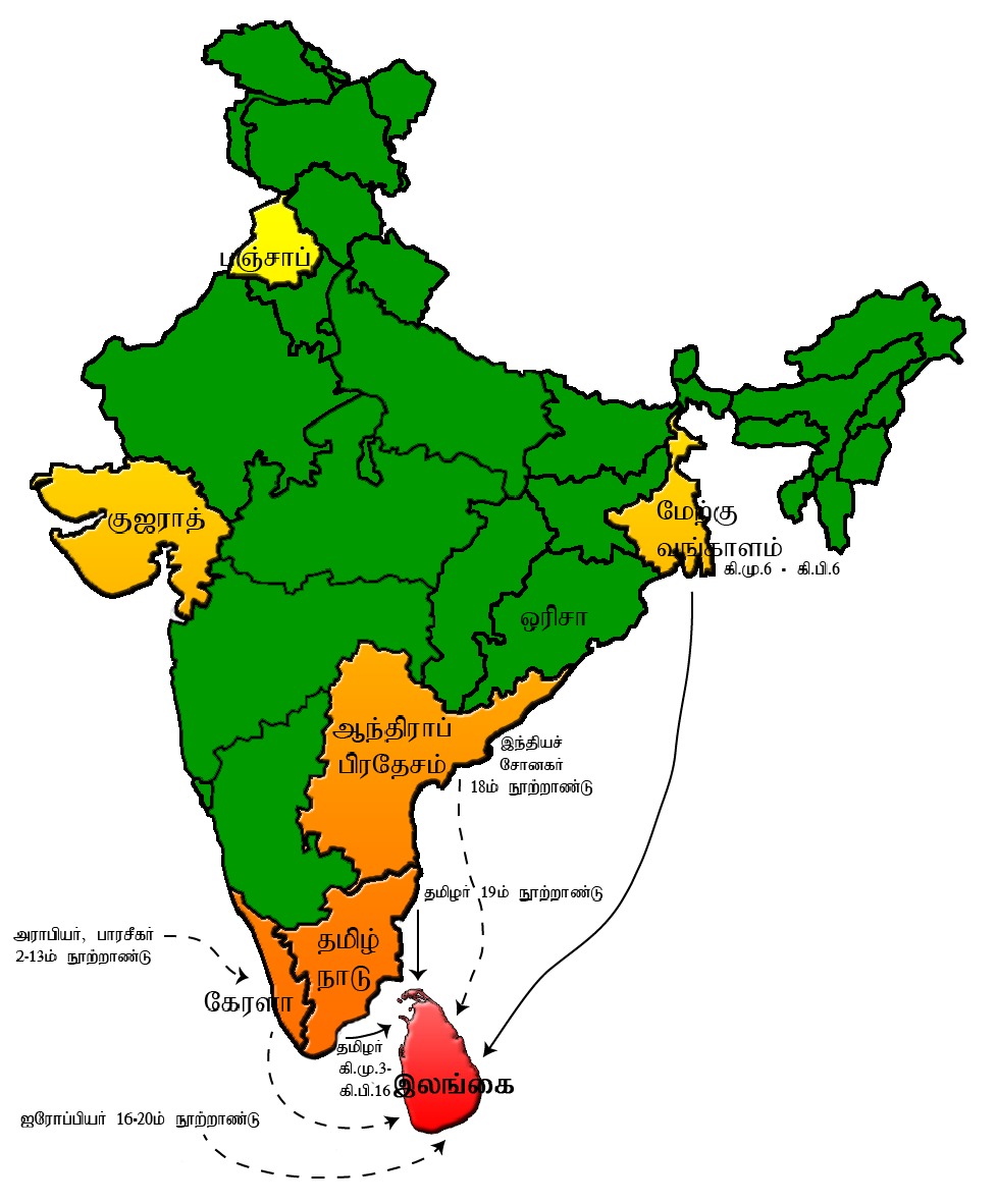 இலங்கைக்கு இடம்பெயர்தல்